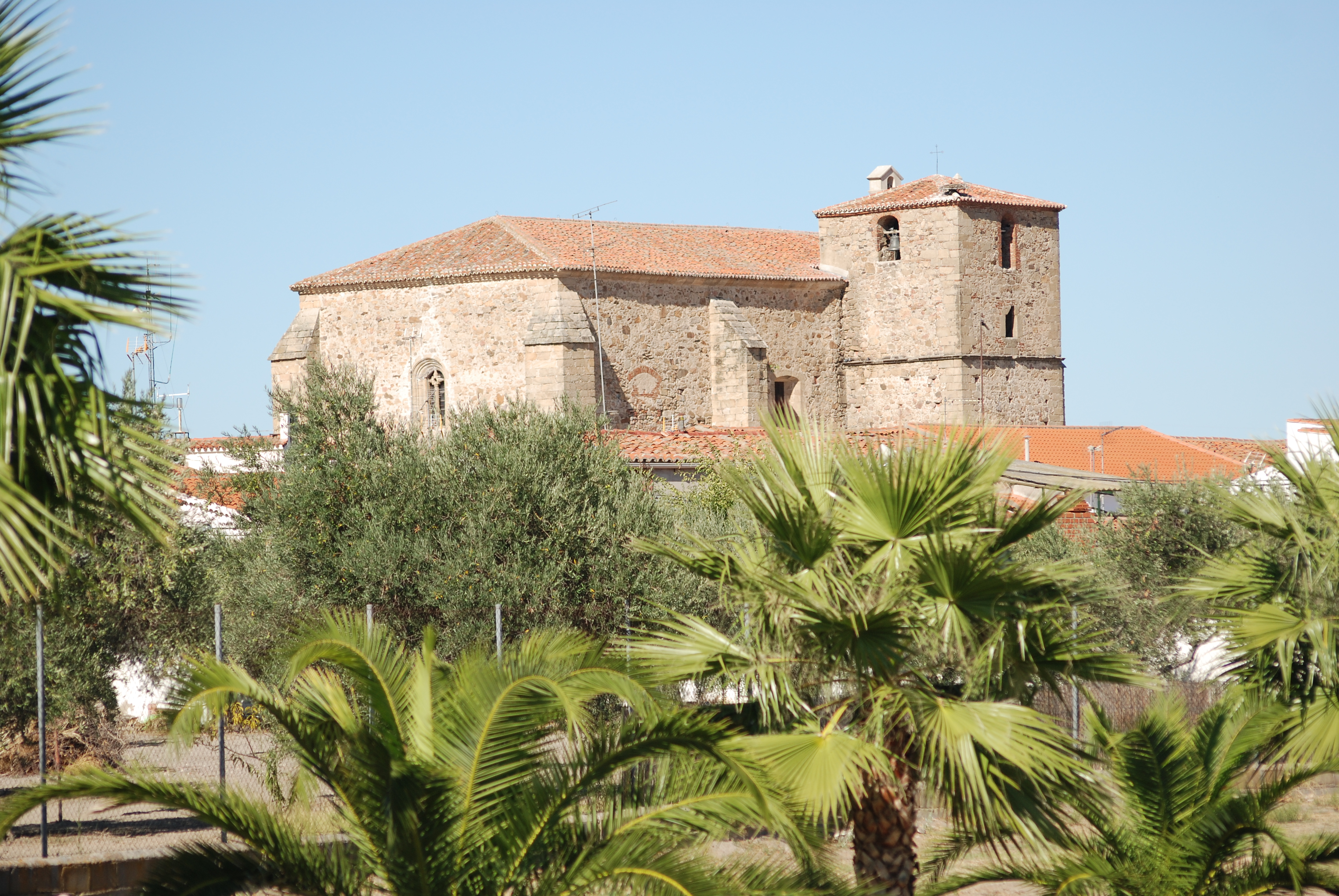 Iglesia de San Juan Bautista (Saucedilla, Cáceres)